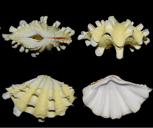 Recorte de Tridacna_costata_and_squamosa.jpg para aislar squamosa